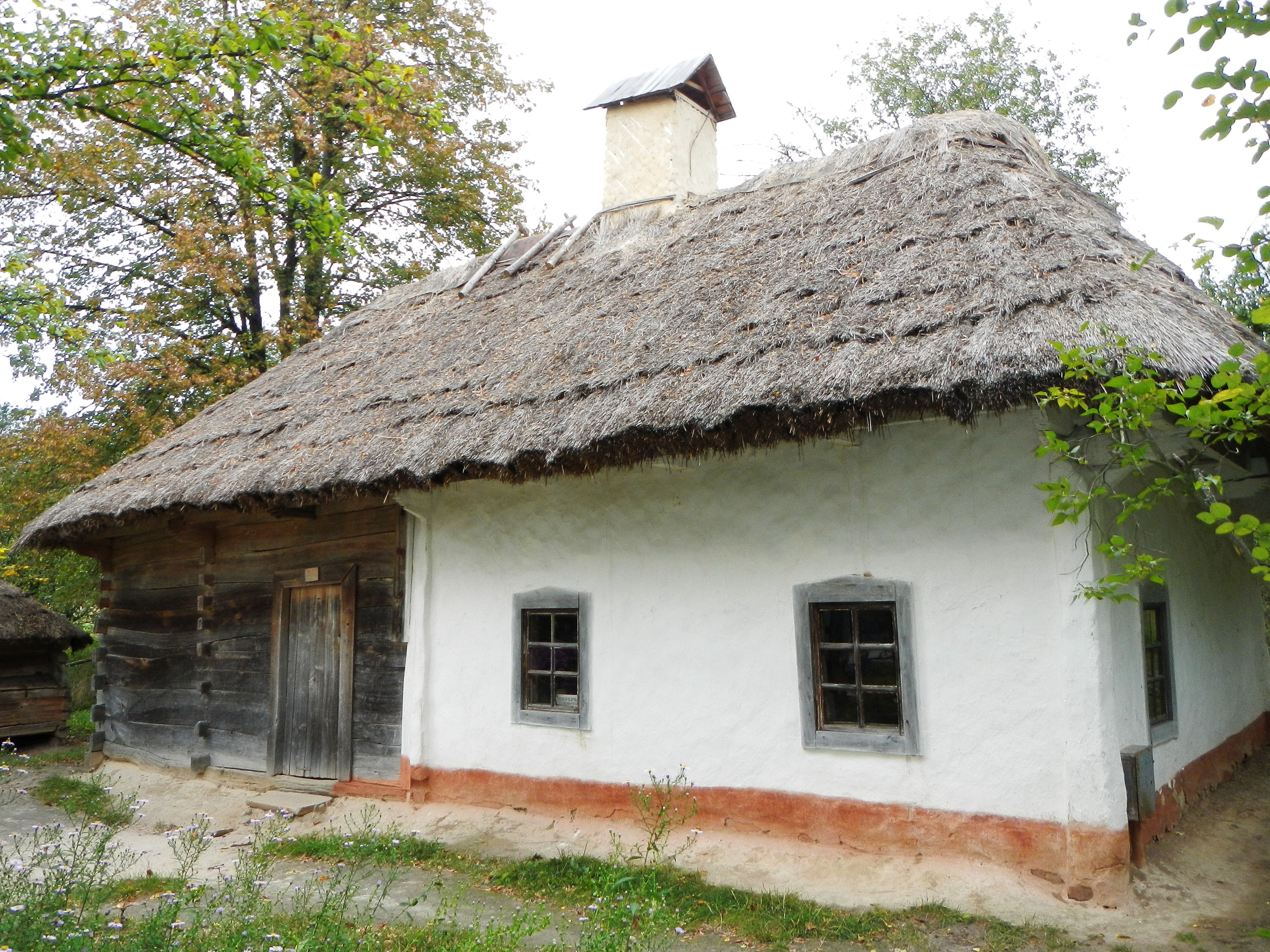 Хата кін. XIX ст. з с. Шишаки Полтавської обл. Пирогове, Київ